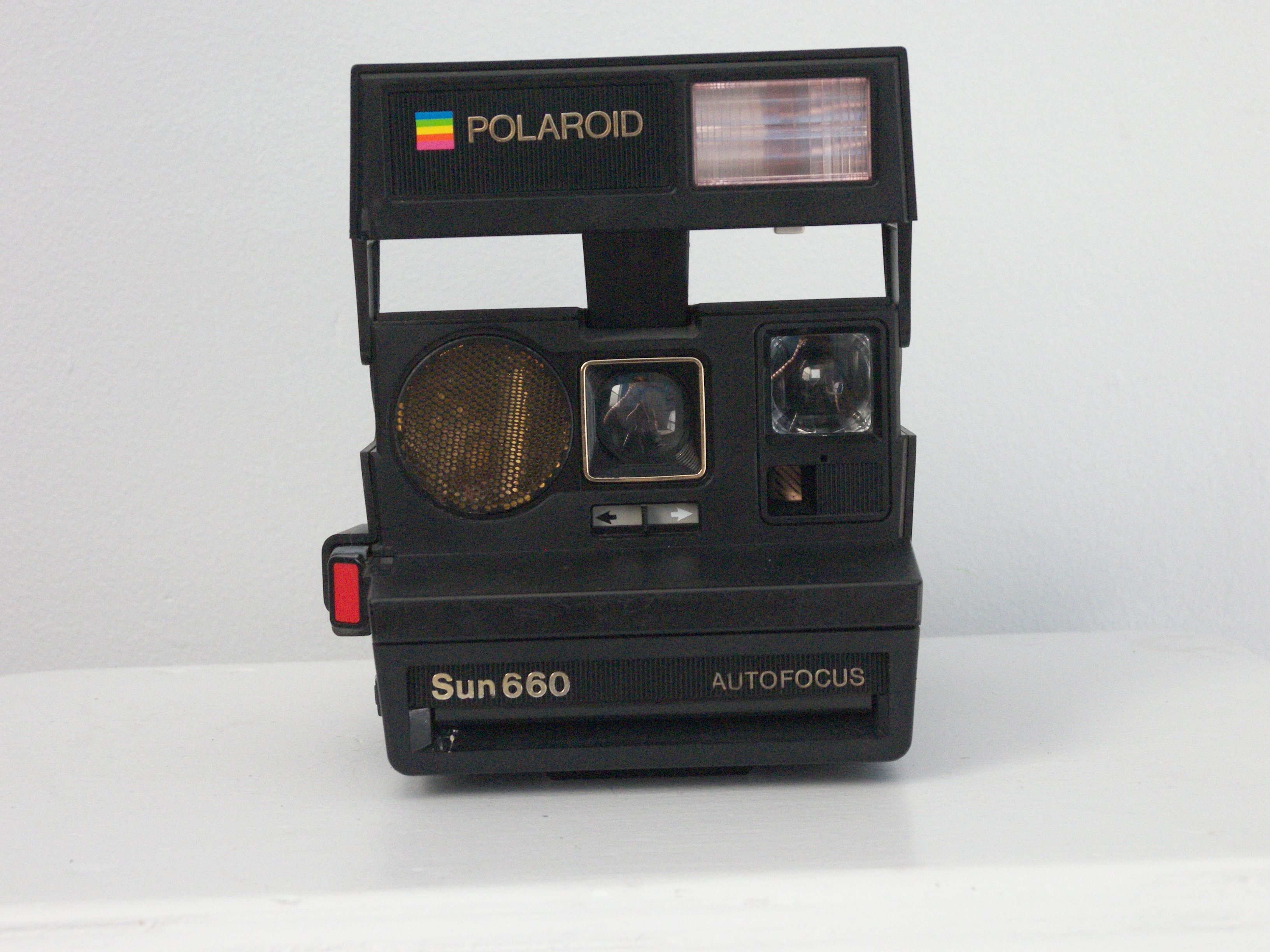 c1981